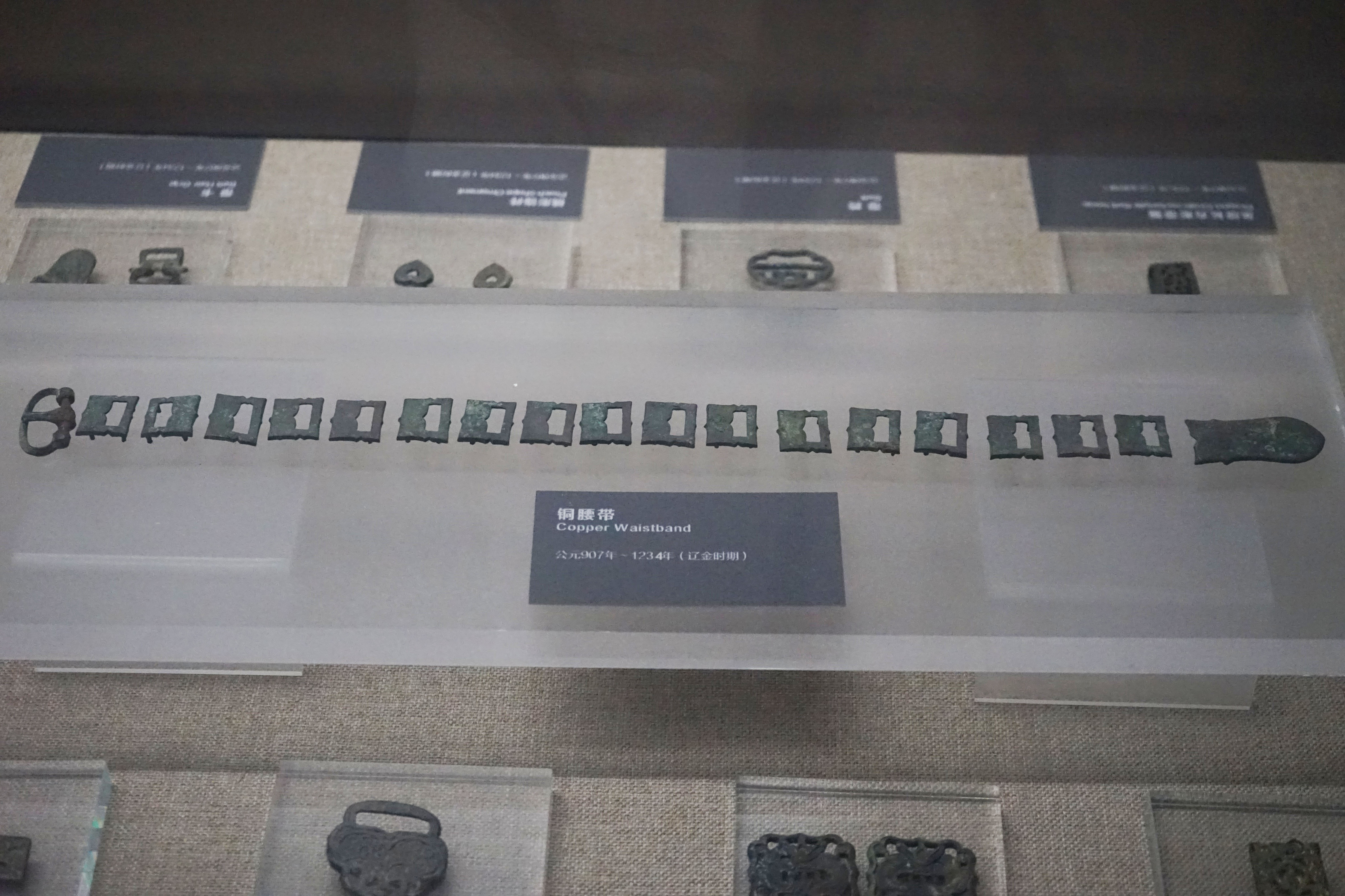 辽金时期铜腰带。大庆博物馆